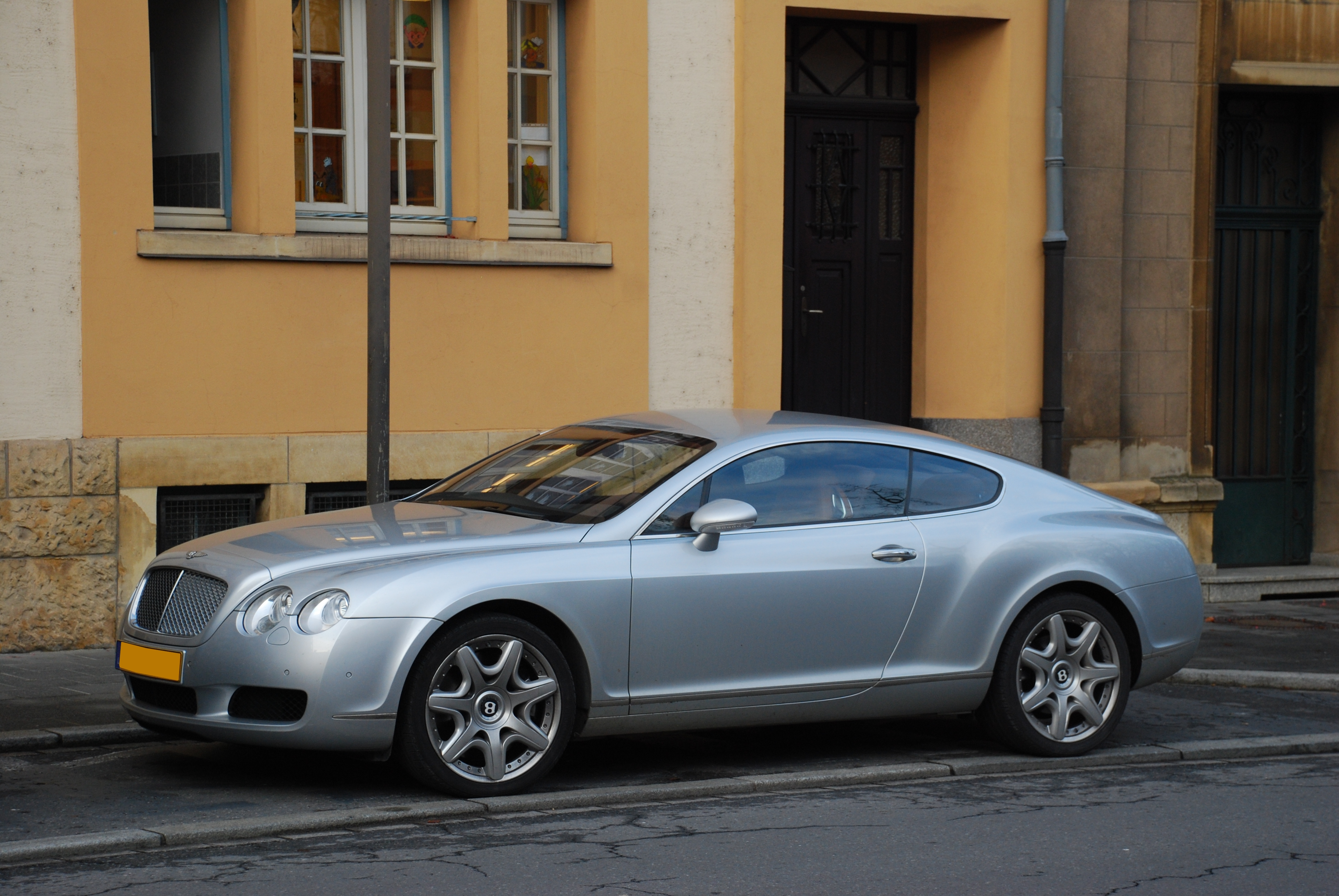 Bentley Continental GT